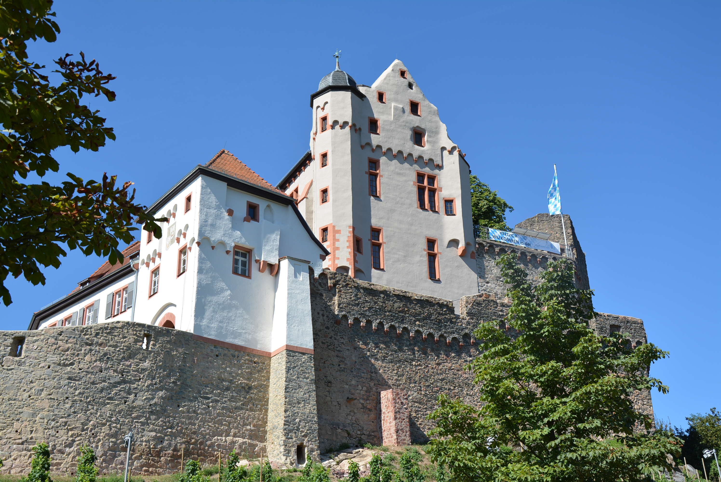 Burg Alzenau aus dem 14. Jahrhundert